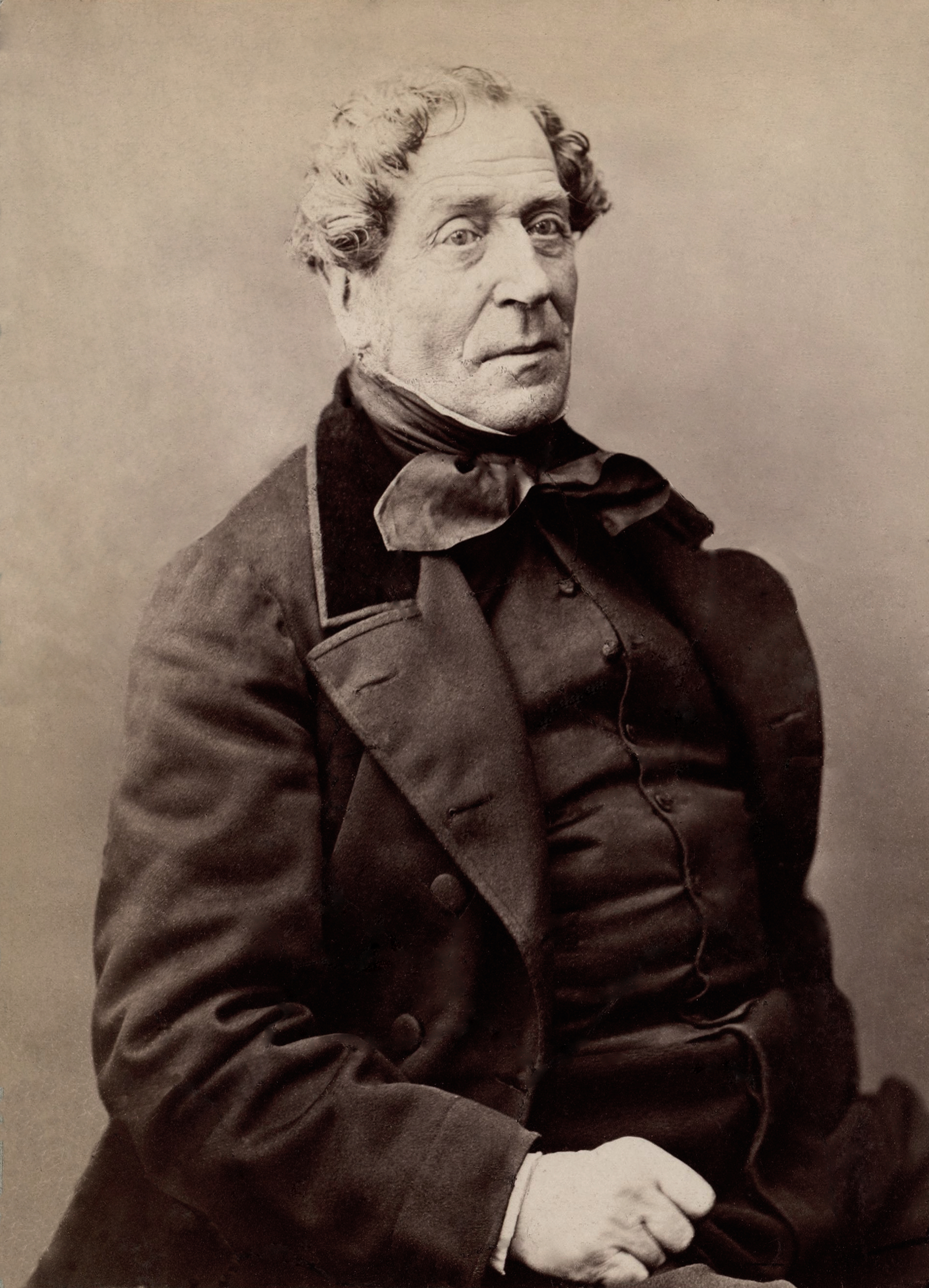 Portrait du graveur